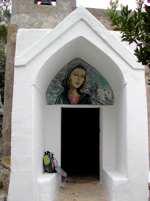 Ingresso dell'Eremo di Santa Maria a Cetrella.